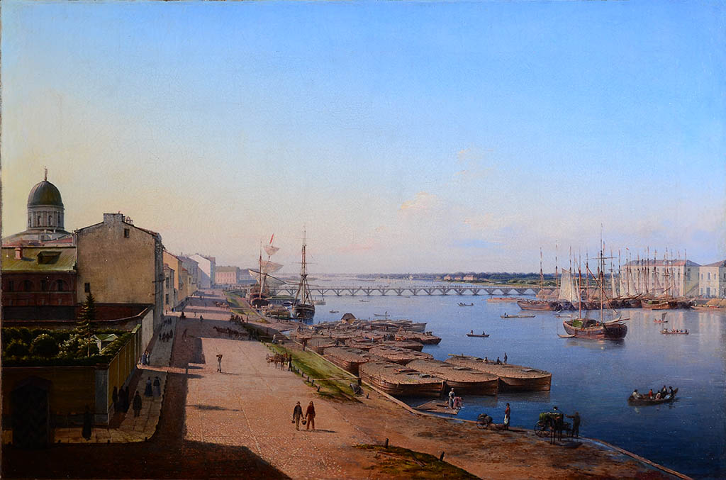 Антон Иванов "Голубой" (1818-1863), "Вид Тучкова моста с окрестностями", не позднее 1844. Холст, масло. Собрание А.Ю. Смурзикова